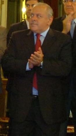 Arturo Colombi, gobernador de la provincia argentina de Corrientes